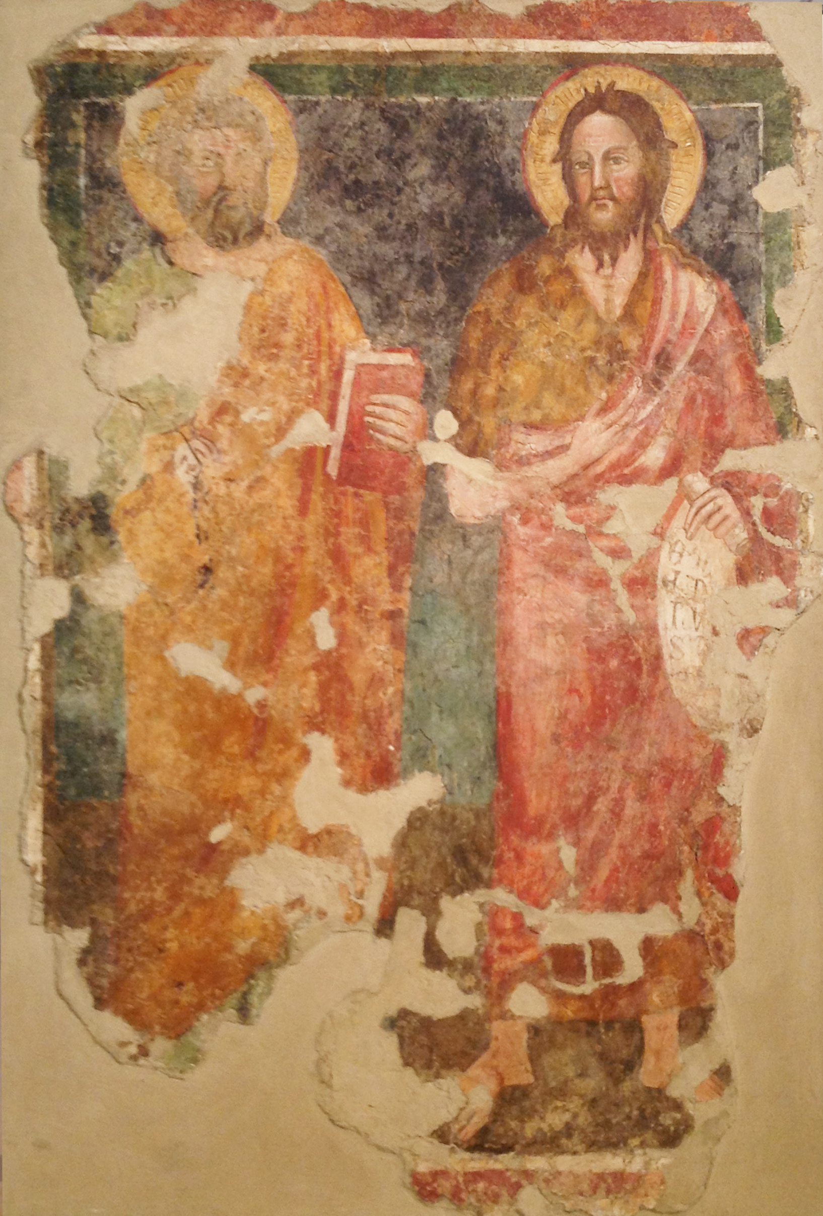 Affresco proveniente dall'ex chiesa di Santa Lucia in Gaeta.